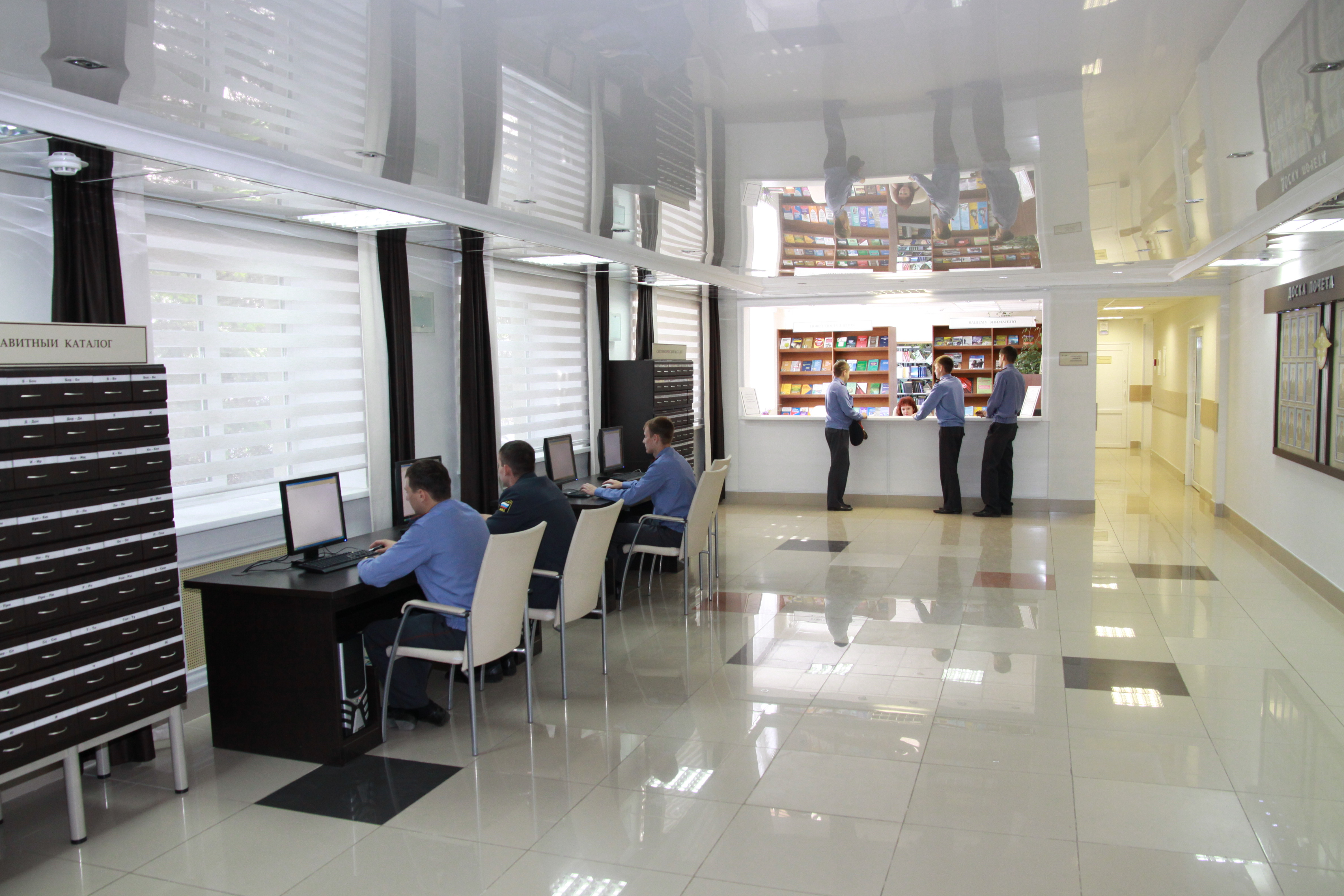 Автоматизированный зал каталогов библиотеки